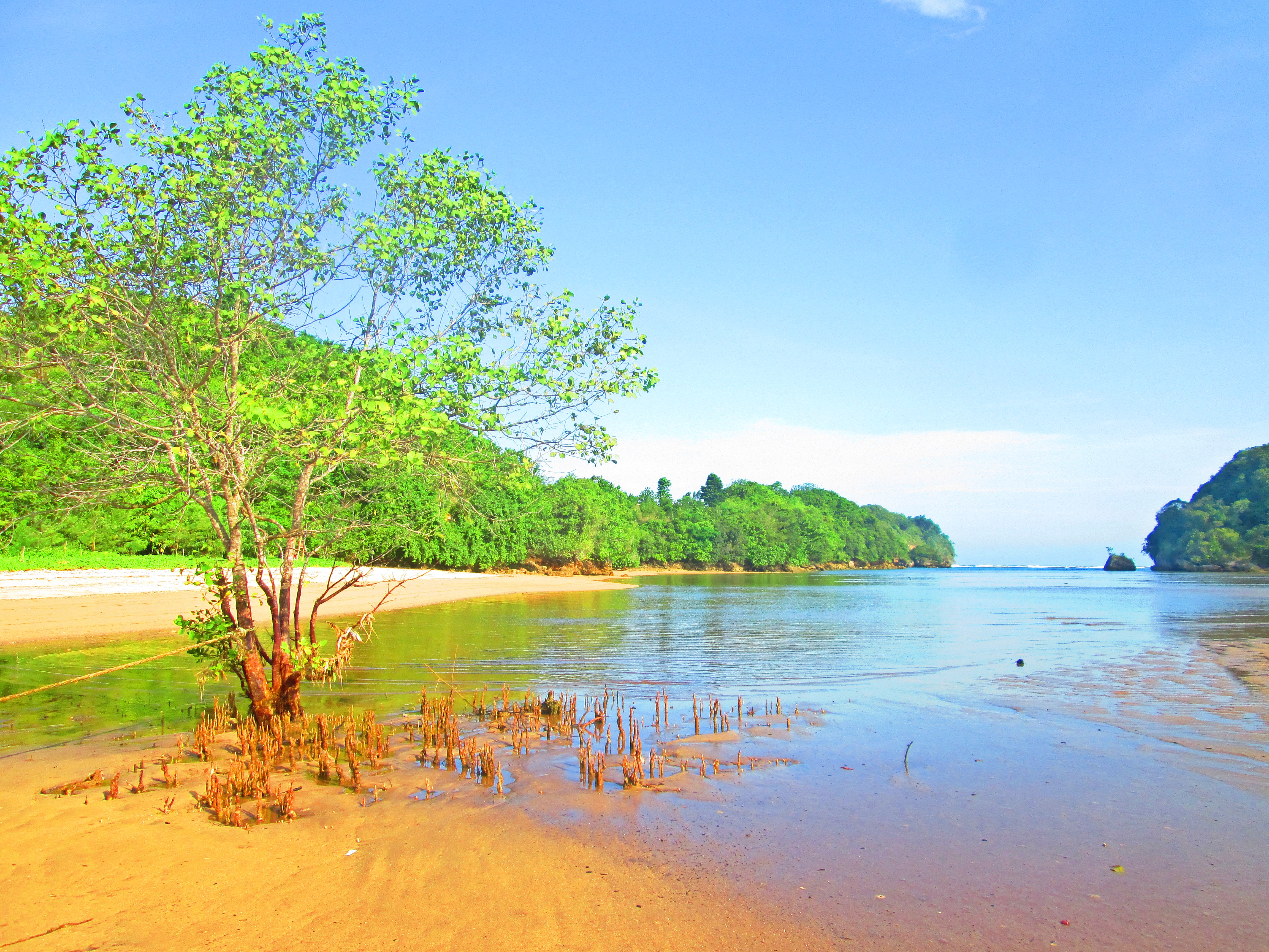 Pantai Clungup merupakan salah satu pantai yang terdapat di Kabupaten Malang Jawa Timur, tepatnya berada di dusun Sendangbiru Desa Tambakrejo. Pantai Clungup memiliki ombak yang sangat tenang ketika pasang, dan terlihat hamparan pasir yang indah ketika surut. Dilihat dari Maps, pantai terlihat seperti teluk, karena letaknya yang menjorok ke daratan. Pantai ini bersebelahan dengan pantai sendang biru, pantai Gatra dan Tiga Warna. Desiran ombak semakin indah dengan tanaman-tanaman mangrove yang mengelilingi pantai ini. I recommend this place as the best destination for your vacation.